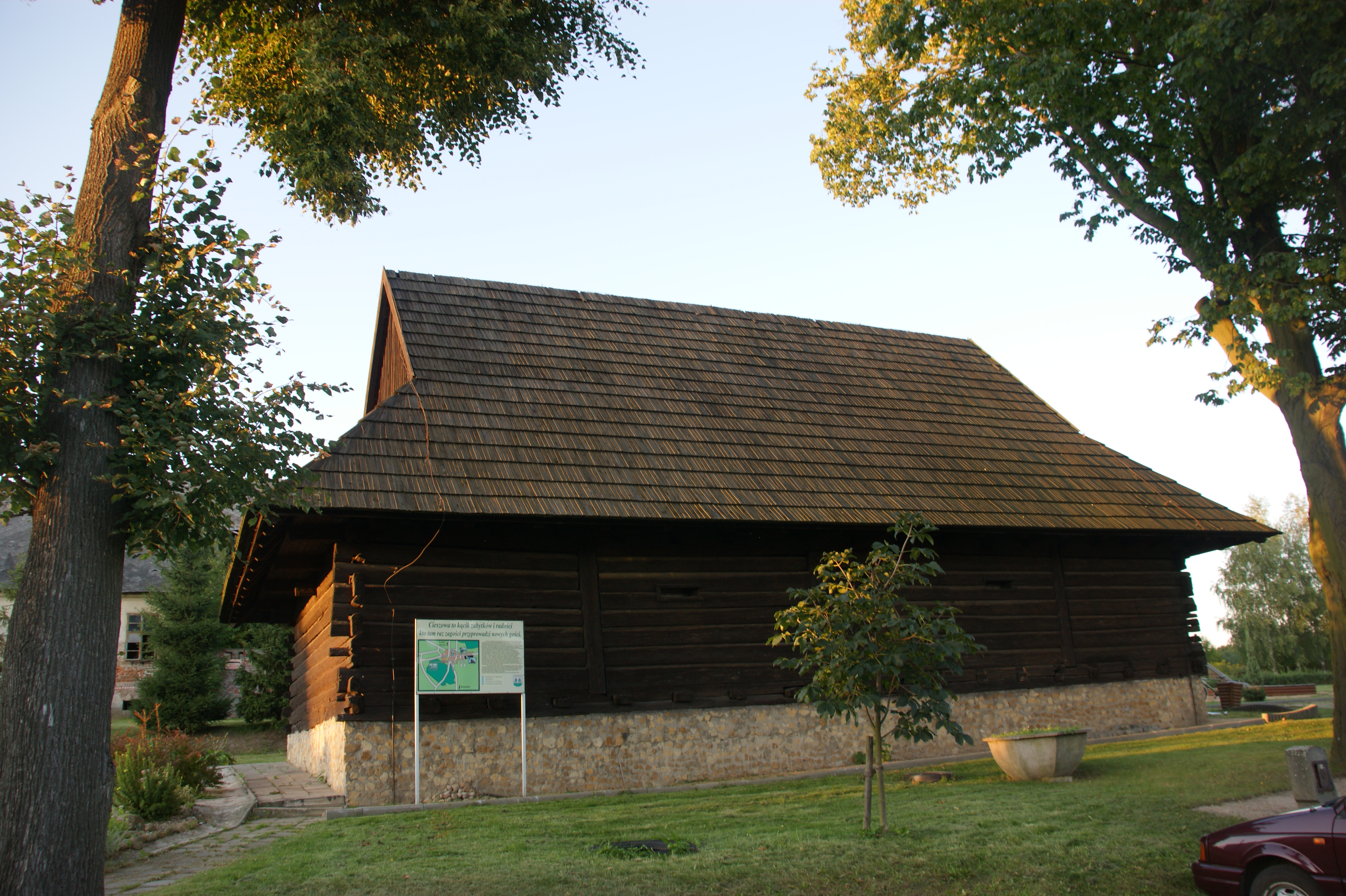 Cieszowa - zespół zabudowań folwarcznych, spichlerz (zabytek nr 73/78)